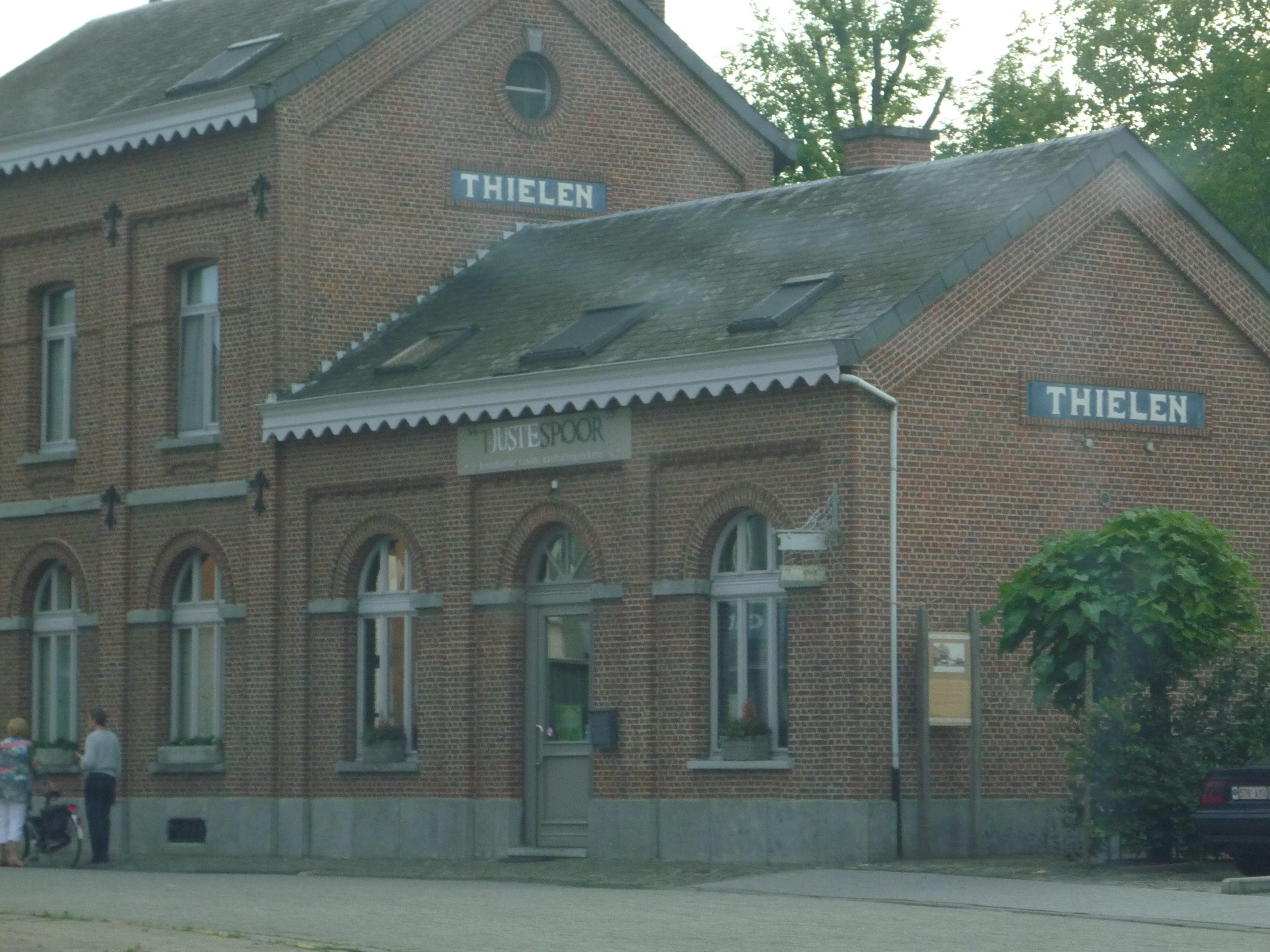 Station van Tielen (België). Getrokken langs straatkant (Stationsplein).